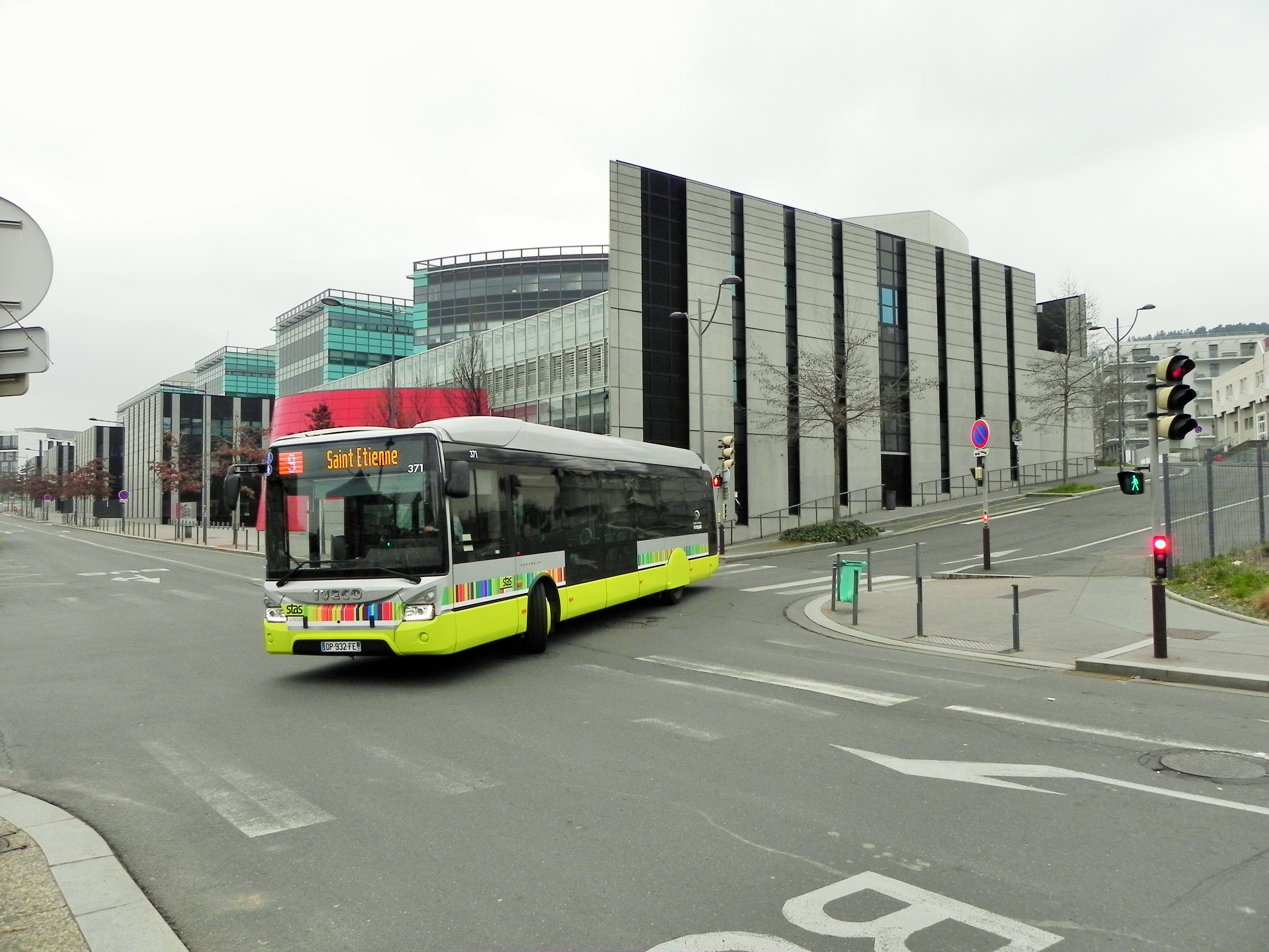 Iveco urbanway 12 €6 BHNS